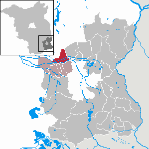 Schmogrow-Fehrow in Brandenburg (Country) - District Spree-Neiße